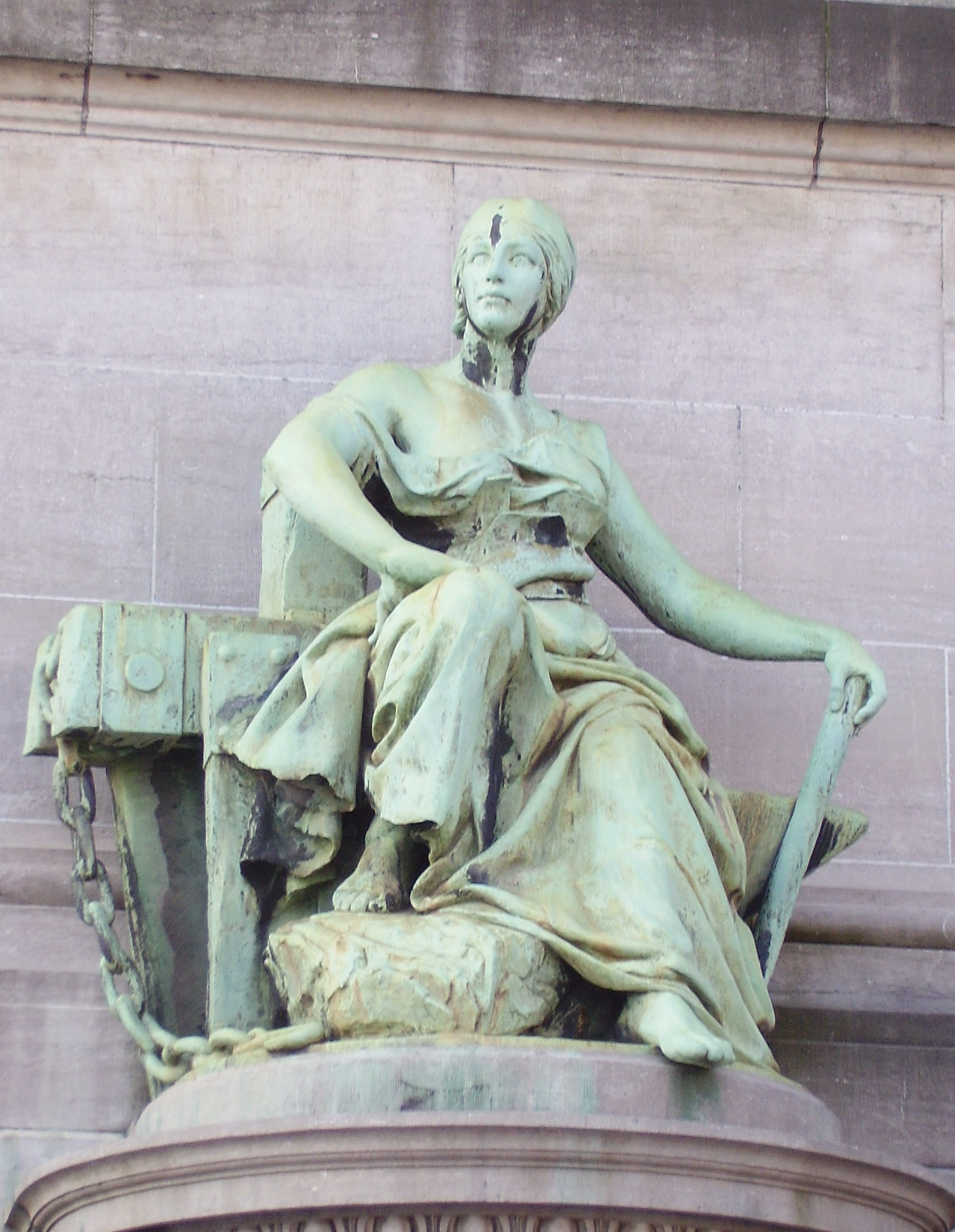 Arcades du Cinquantenaire, Bruxelles - Province de Hainaut par Albert-Constant Desenfans